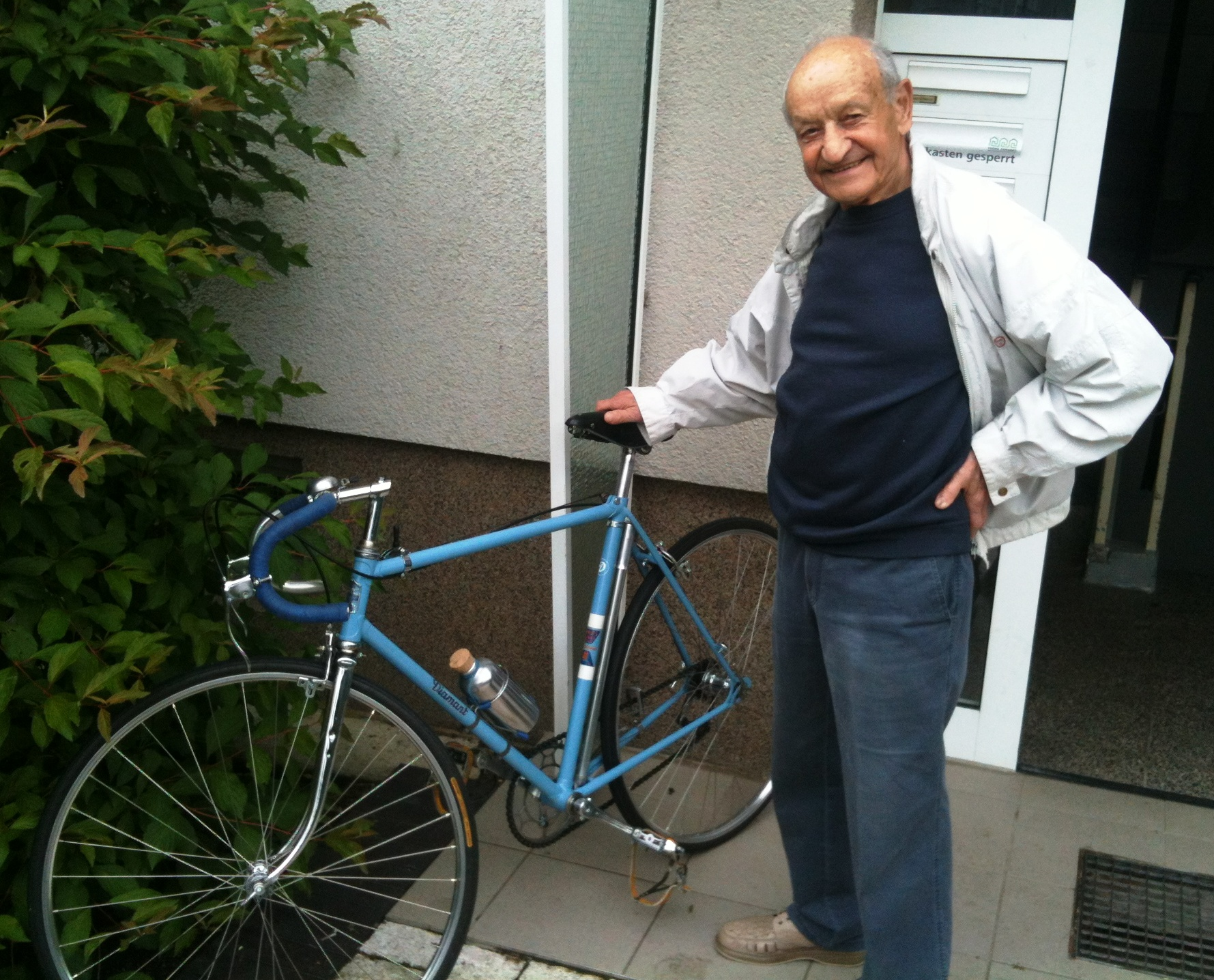 Edgar Schatz, DDR-Straßenmeister von 1950 (2012)